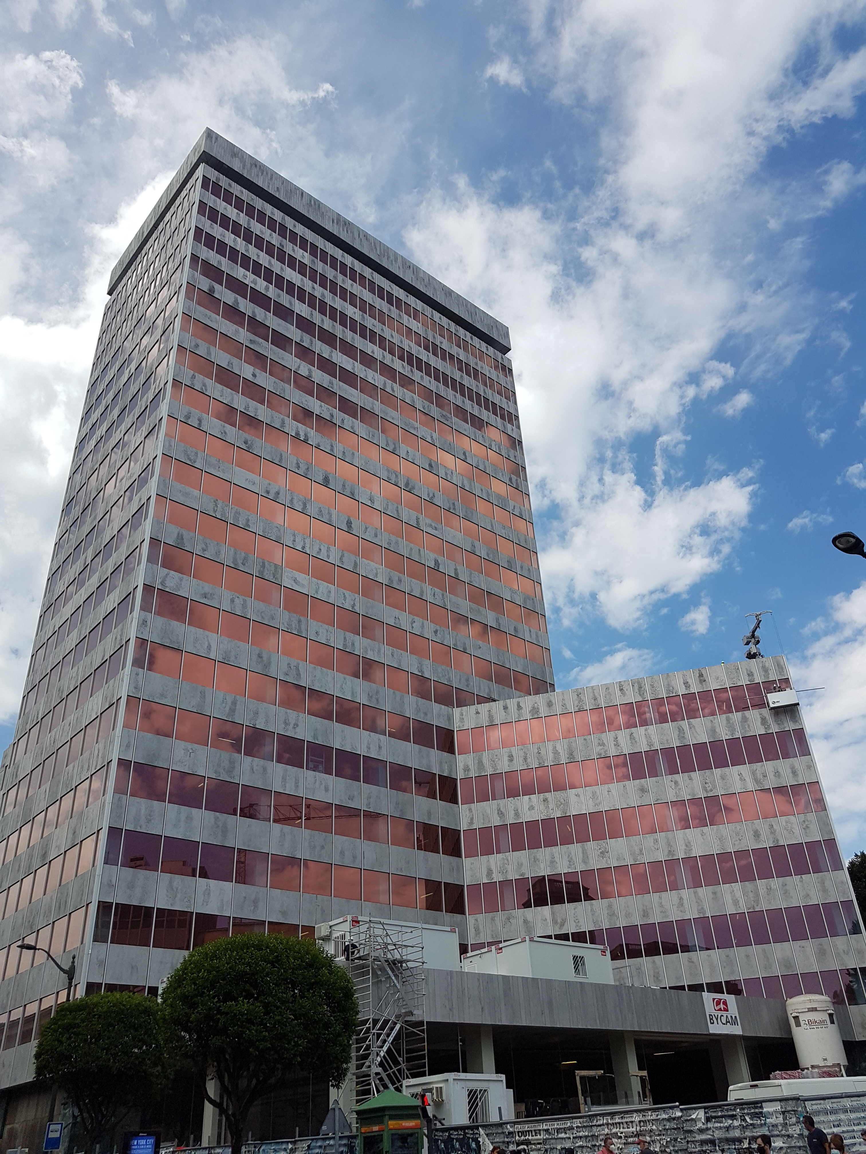 Torre Bizkaia con su fachada remodelada.